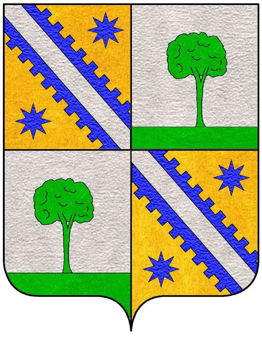 Stemma della famiglia Sfondrati